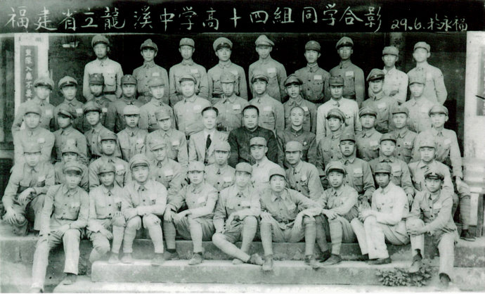 中文（中国大陆）: 1940福建省立龙溪中学高14组毕业照